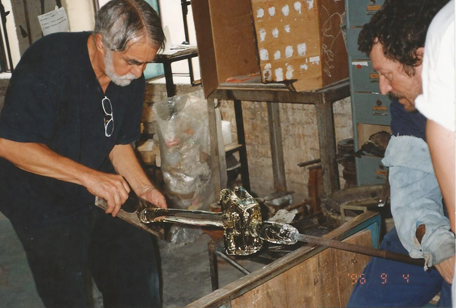 איזיקה גאון במפעל הזכוכית "צ'נדזה" במורנו, איטליה